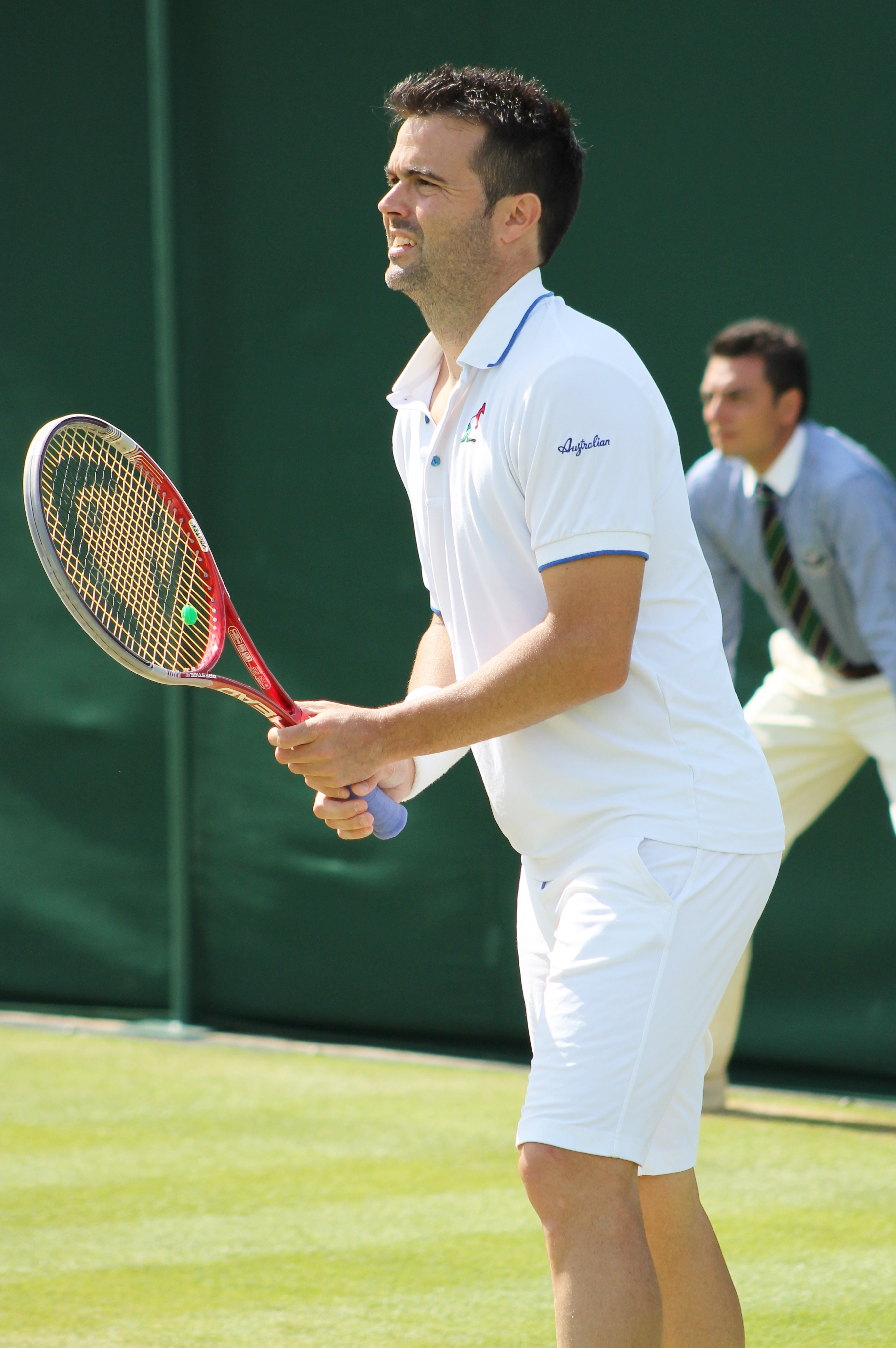 Bracciali WM13-003